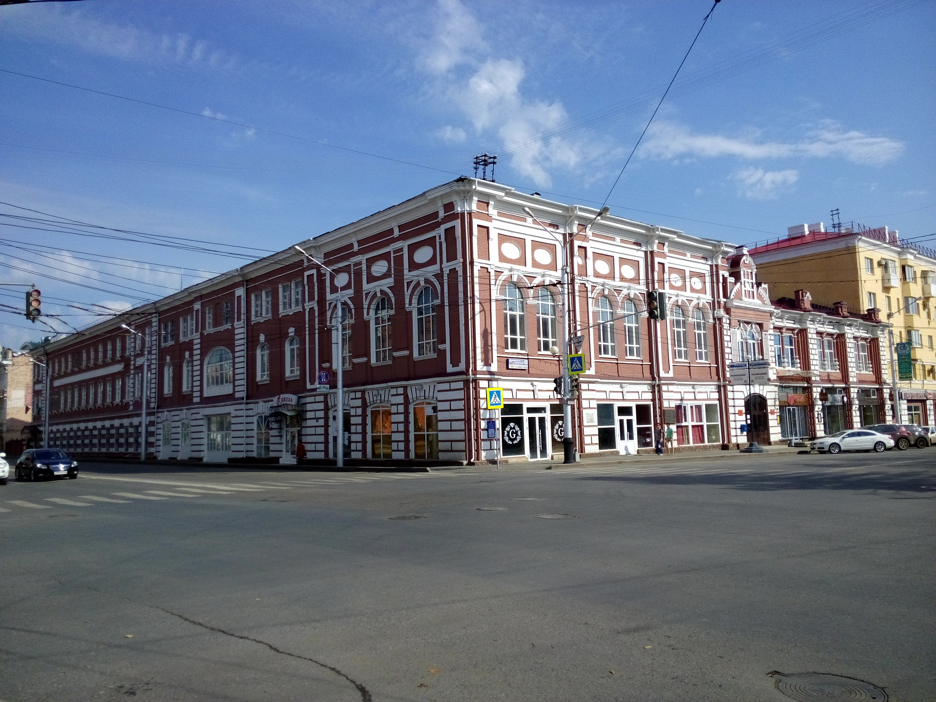 Большая сибирская гостиница: улица Карла Маркса, 14 / улица Коммунистическая, 43, Уфа, Башкортостан